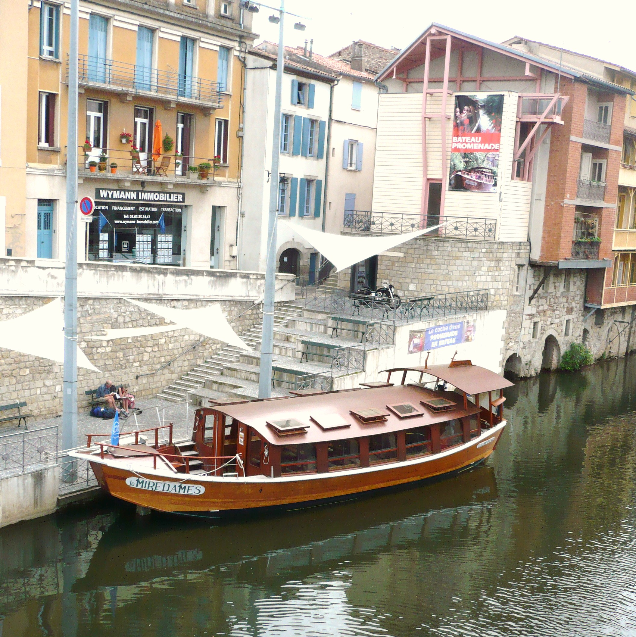 Le célèbre Coche d'eau, contruit en 1990 sur le modèle des diligences fluviales du XIXe siècle, fabriqué avec du bois à Castres dans le département français du Tarn.